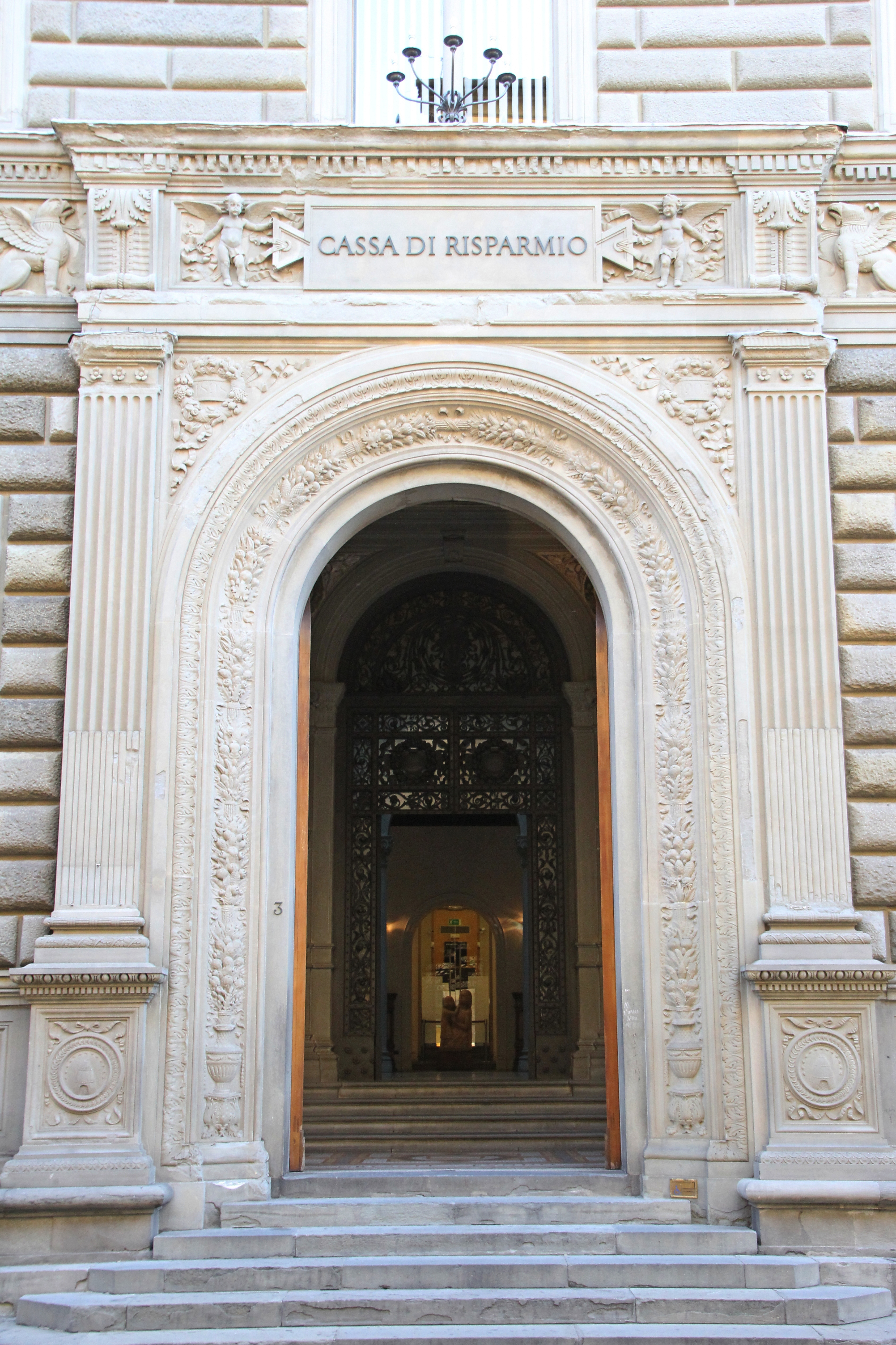 Pistoia, palazzo della Cassa di Risparmio